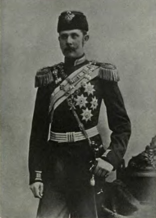 Francisco Fernando de Austria, heredero al trono austrohúngaro, asesinado en Sarajevo en 1914.